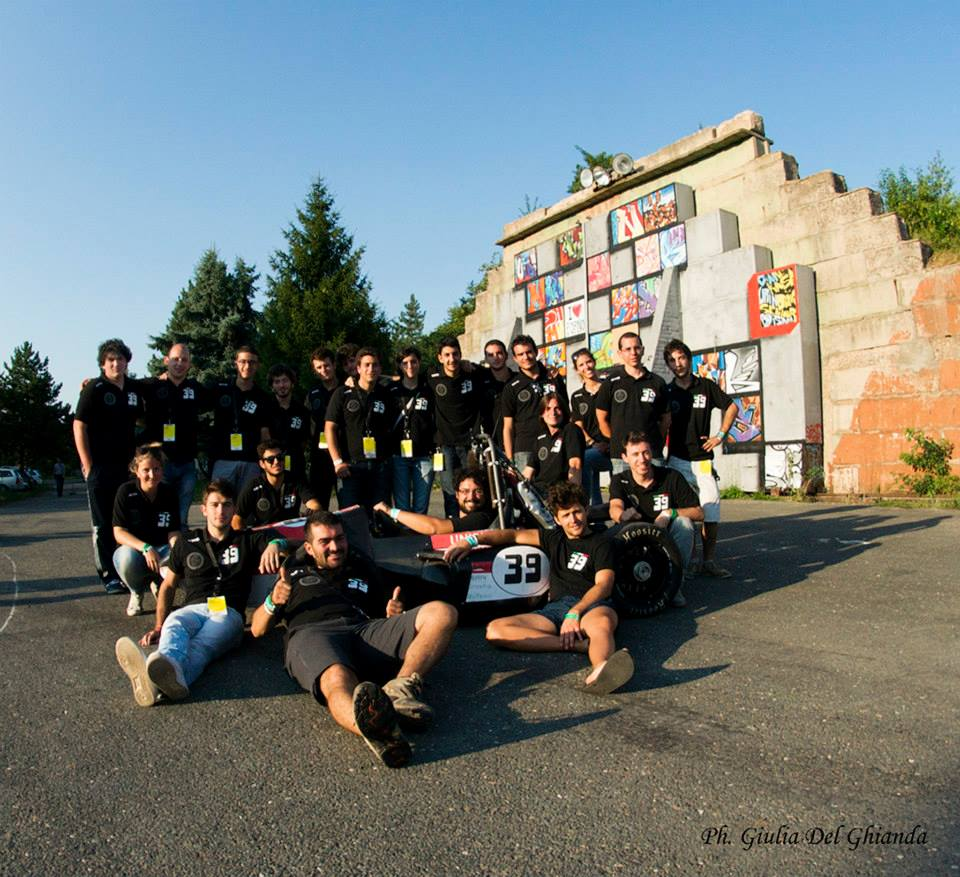 ETeam in Repubblica Ceca 2013